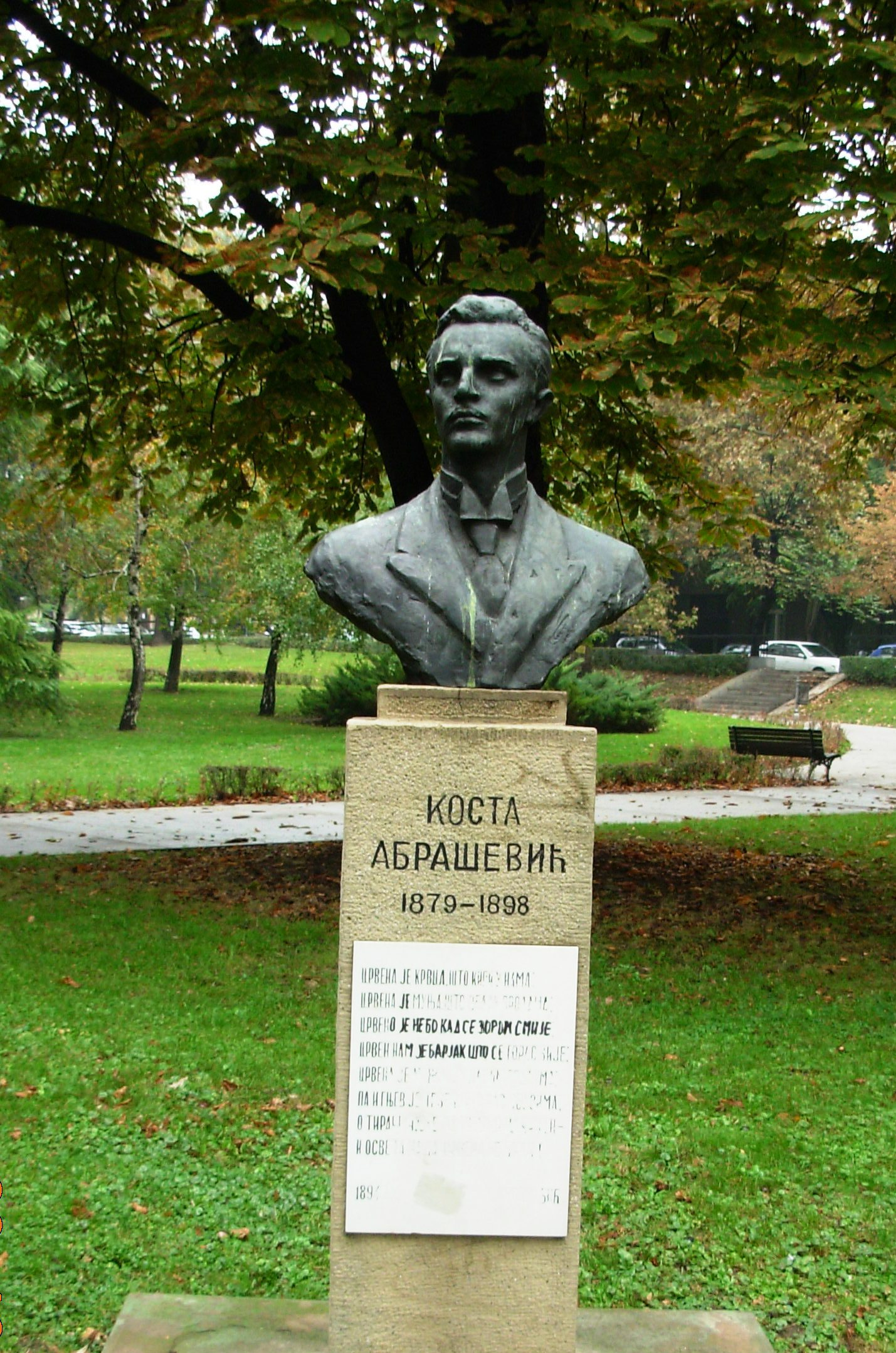 Коста Абрашевић у парку Мањеж у Београду. Сликао Голдфингер